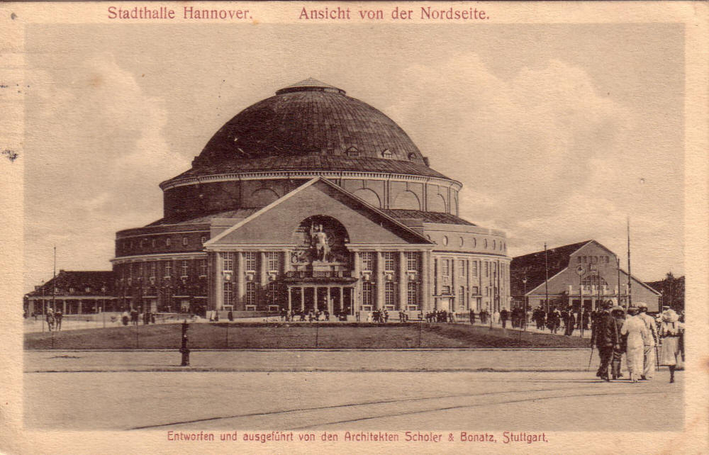 24.10.1915 Hannover Stadthalle damals